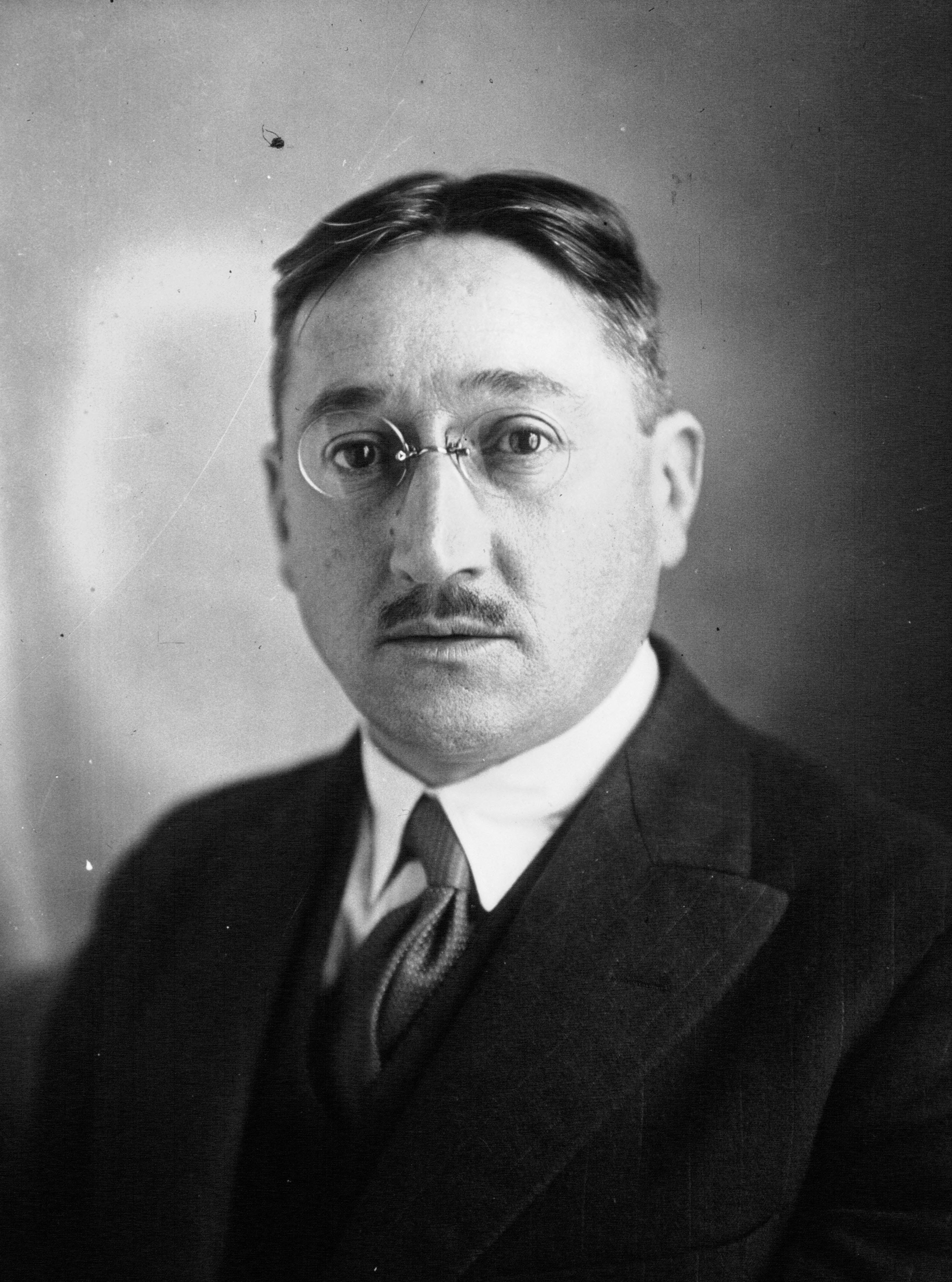 Lamoureux Lucien, député (Allier).